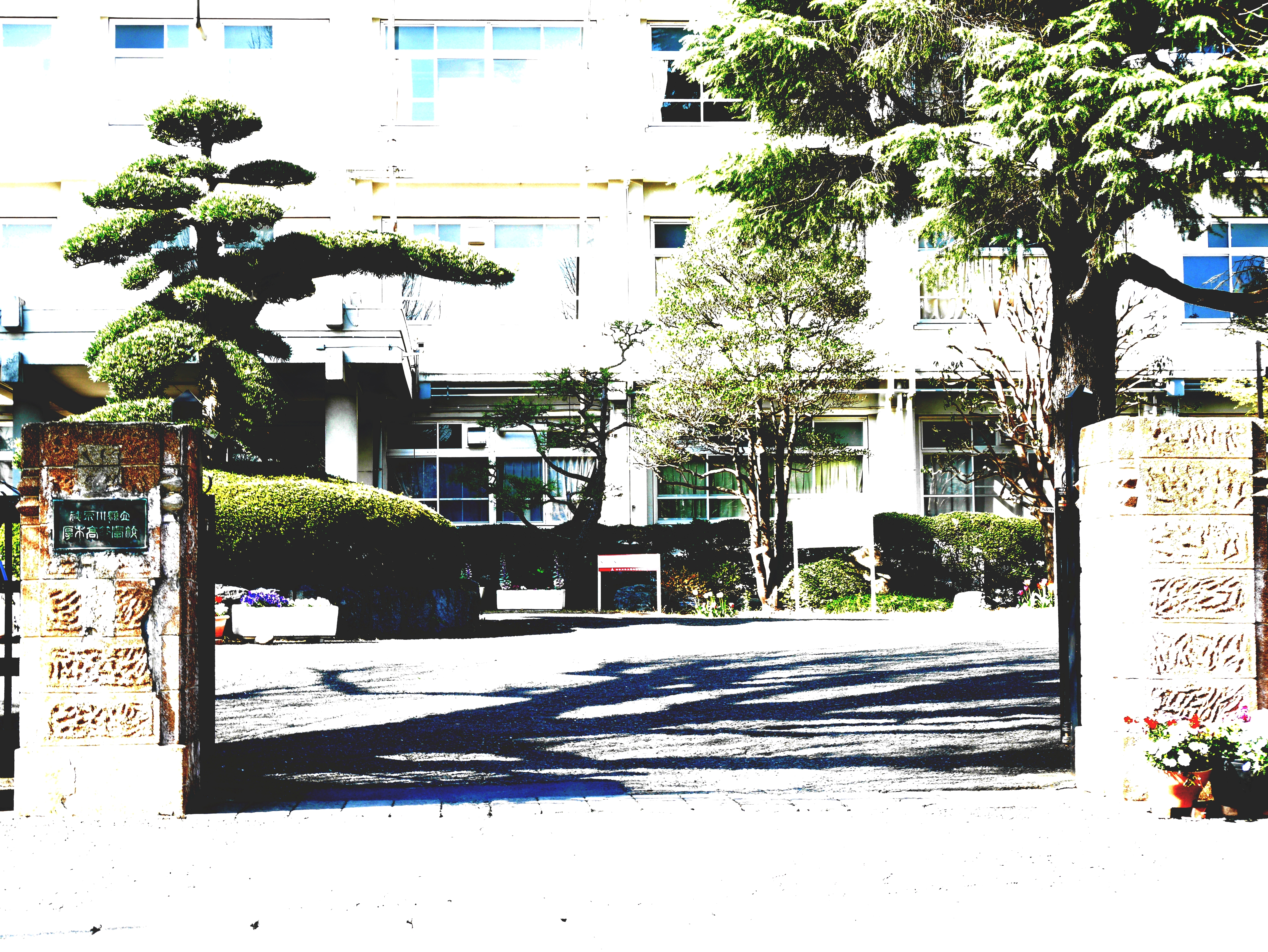 神奈川県立厚木高等学校校門（遠景）